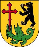 Blazono de Gossau SG, elektodistrikto Sankt-Galo, Kantono Sankt-Galo, Svislando